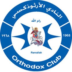 النادي الأرثوذكسي - رام الله